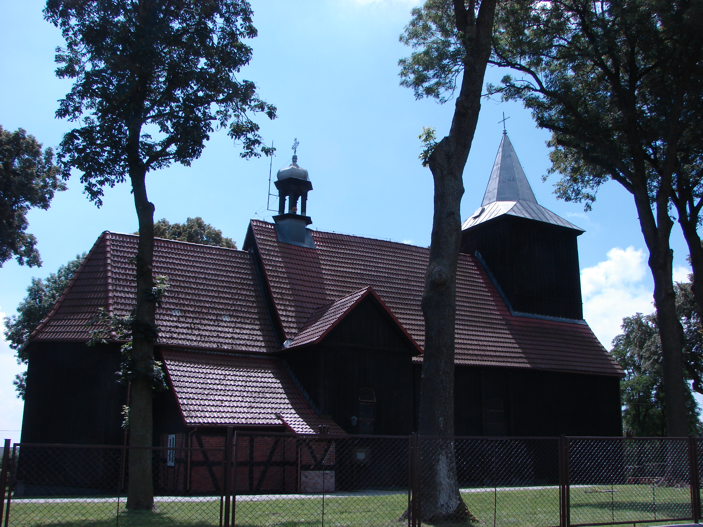 Liszkowo, zespół kościoła par. pw. św. Anny